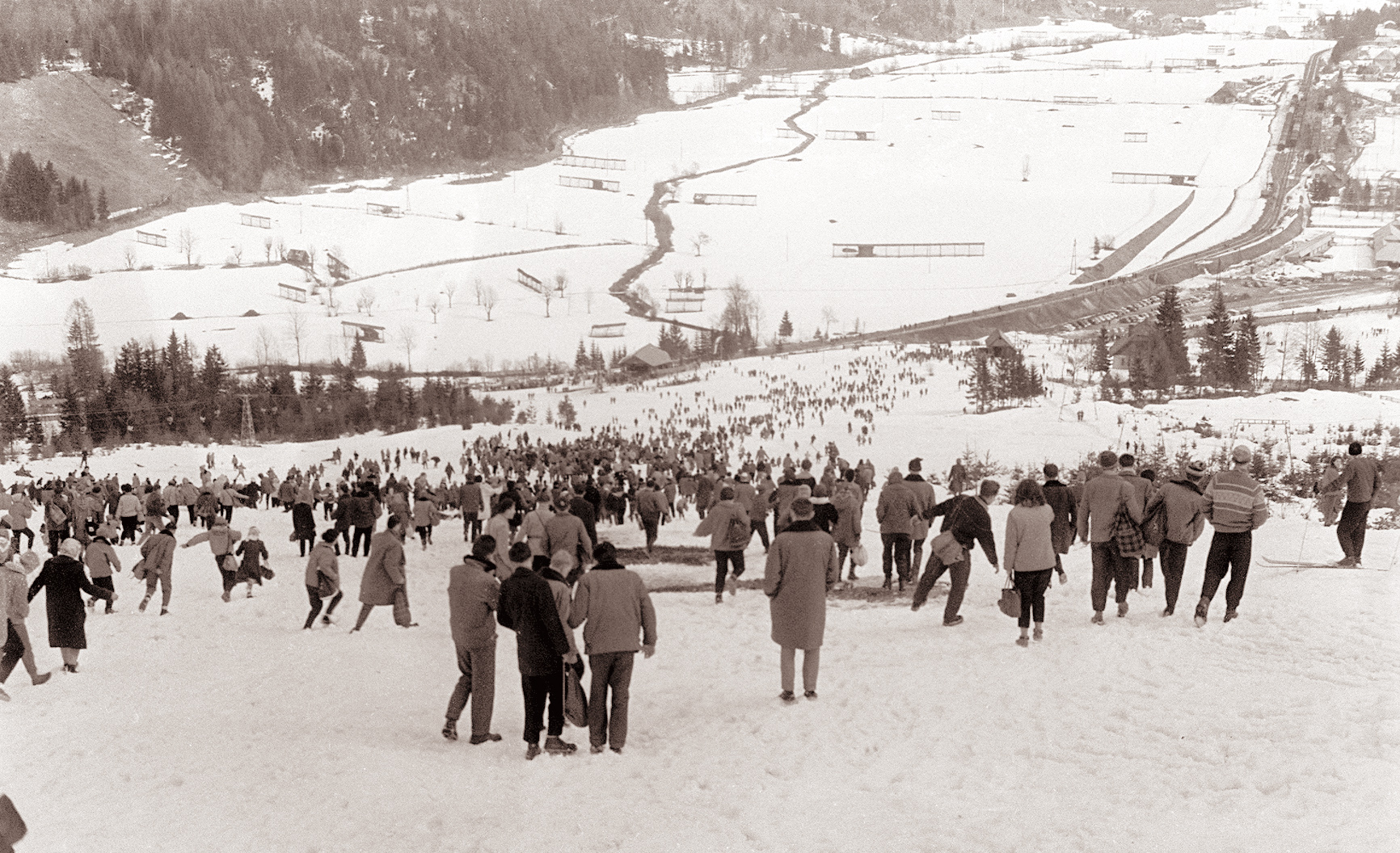 Prvi Pokal Vitranc v Kranjski Gori